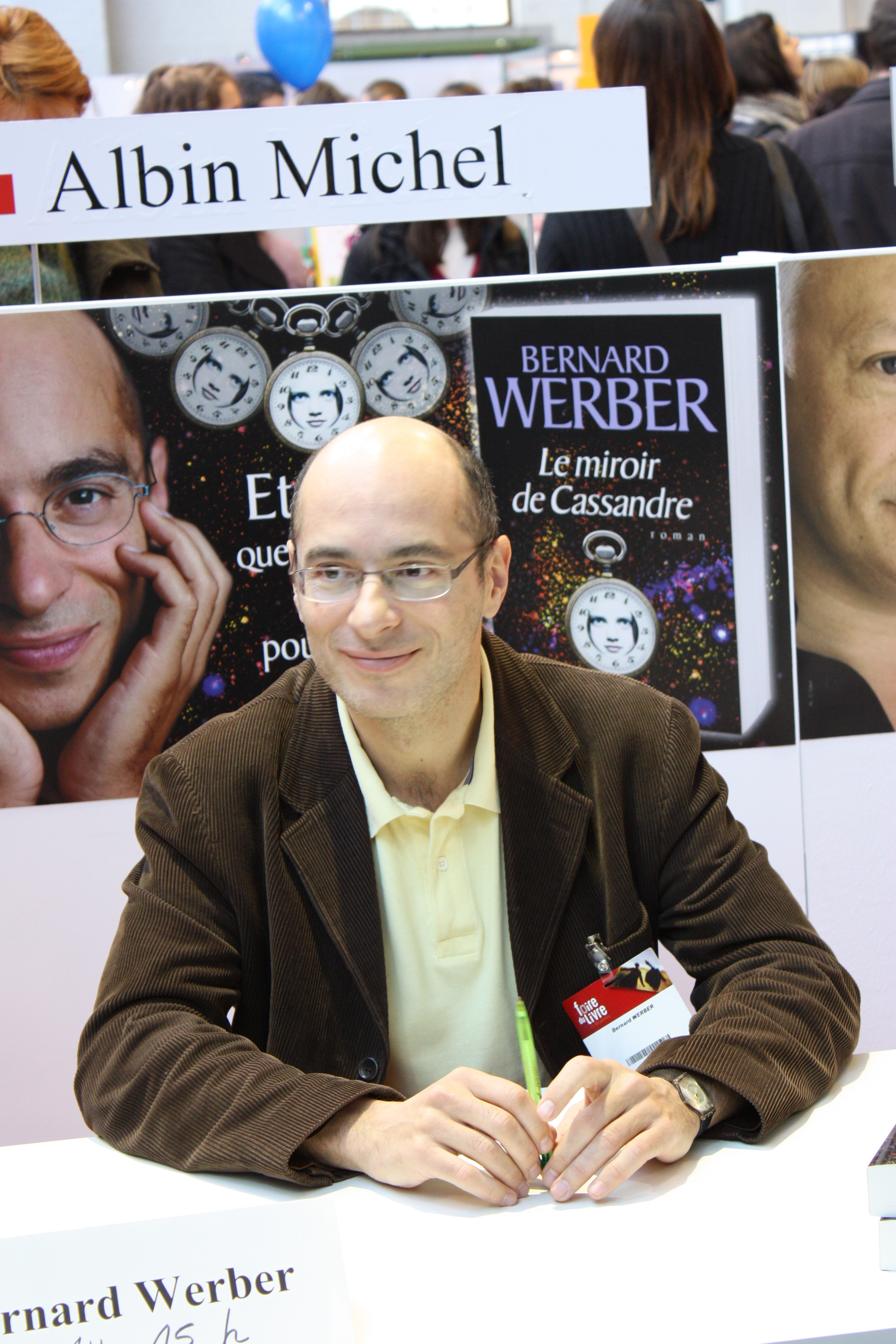 Bernard Werber durant une séance de dédicace lors de l'édition 2010 de la Foire du Livre de Bruxelles.